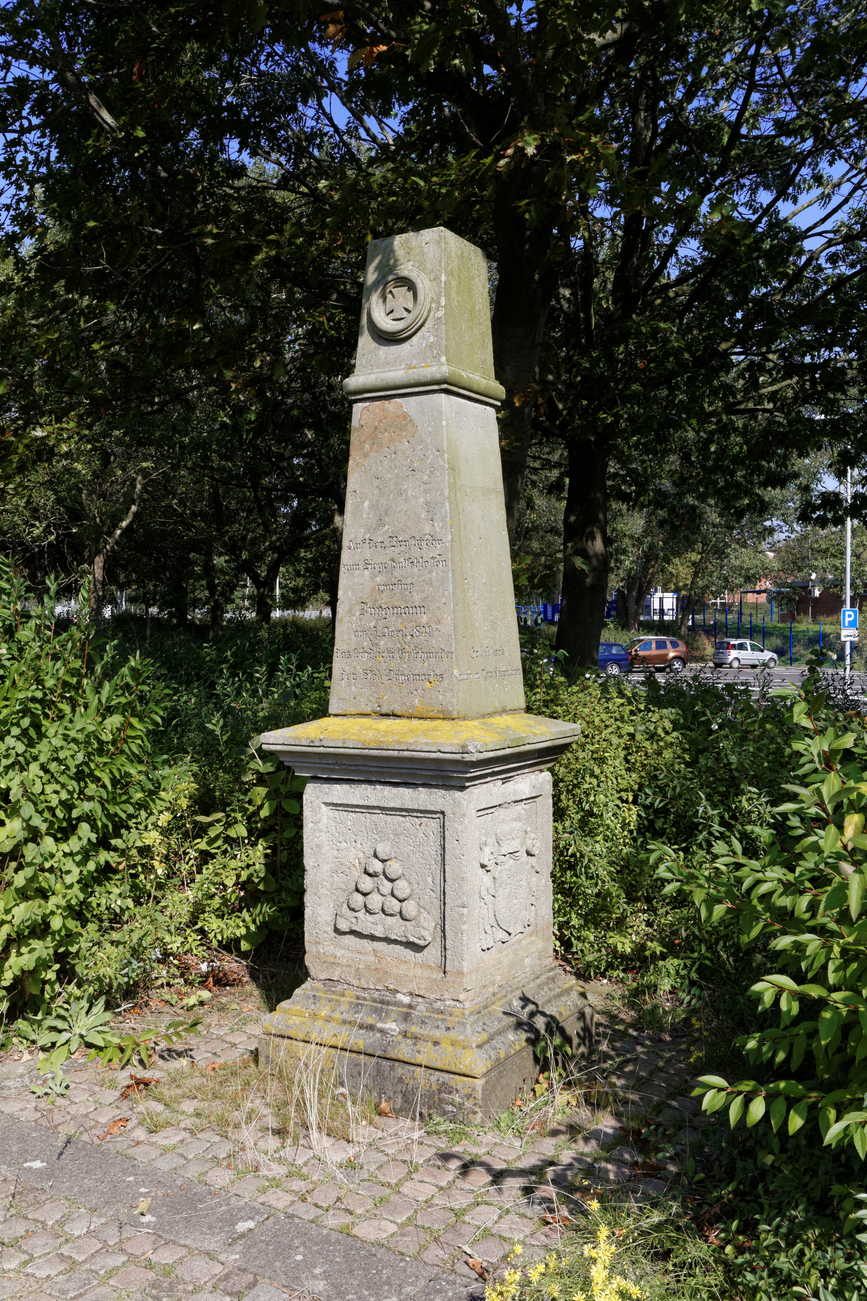 Eckernförde, Am Ort; Ehrenmal für Major Jungmann (Nordschanze)